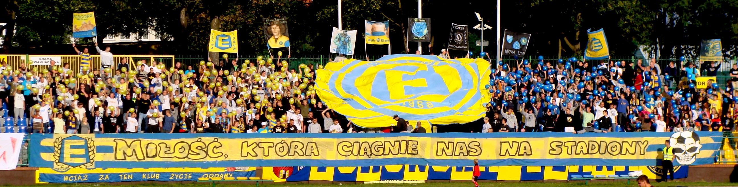 Mecz II ligi (grupy zachodniej) Elana Toruń - Chrobry Głogów